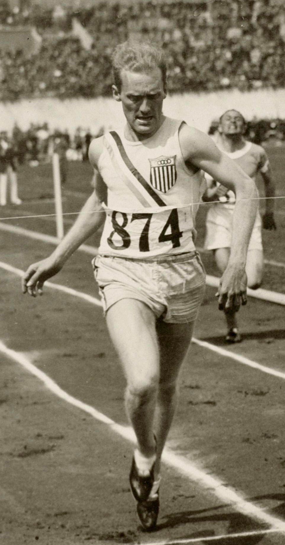 Sport. Olympische Spelen 1928 Amsterdam, Nederland : De Amerikaan Frank Morgan Taylor in actie tijdens de tweede halve finale van de 400 m horden. Hij zou brons winnen.